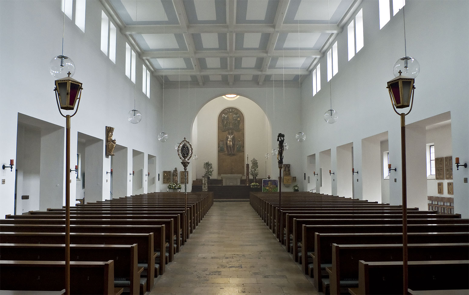 St.-Sebastian-München Innen